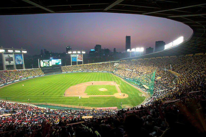 Seoul Jamsil Stadium.